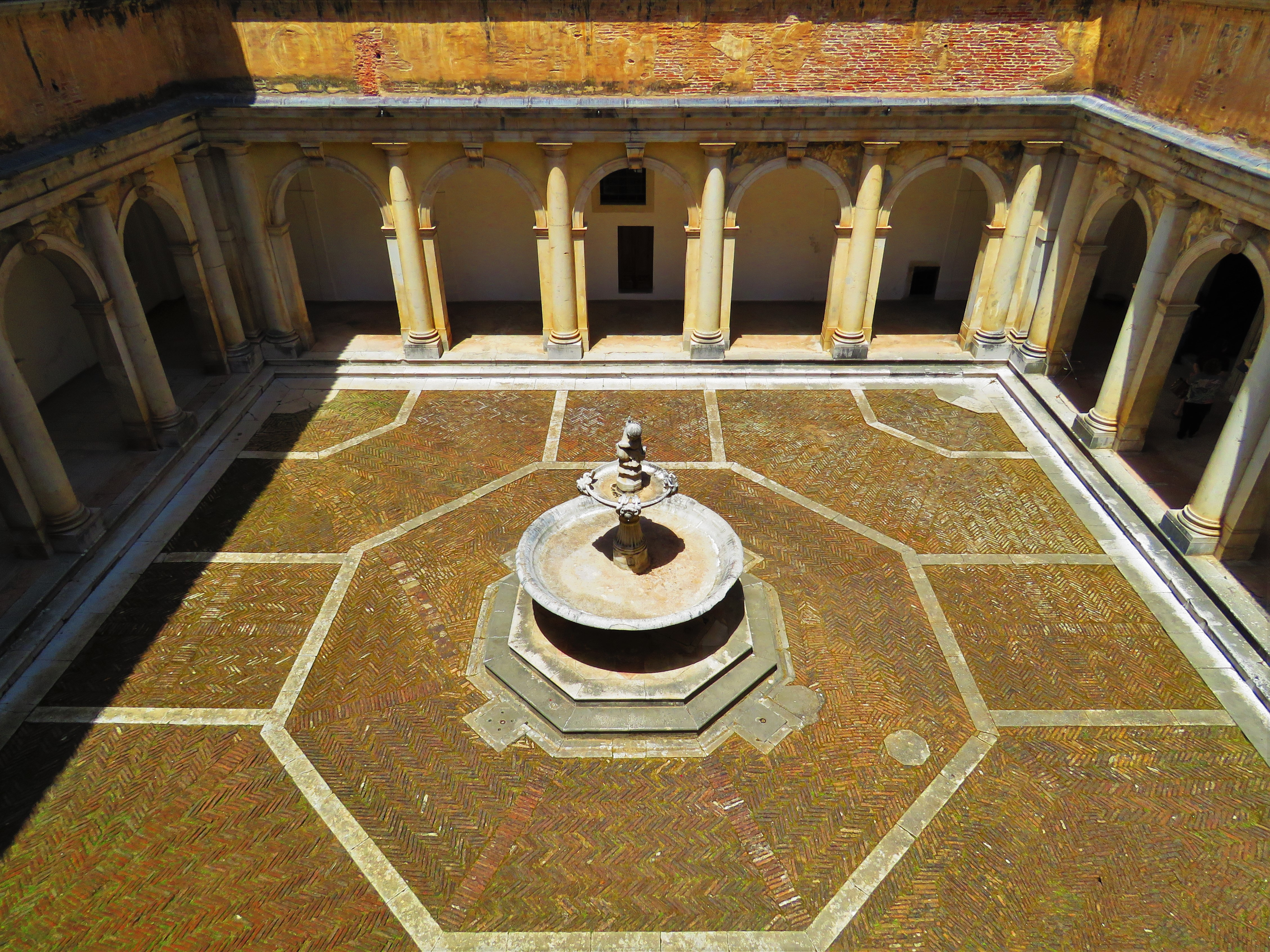 Chiostro della Foresteria nella Certosa di San Lorenzo a Padula.